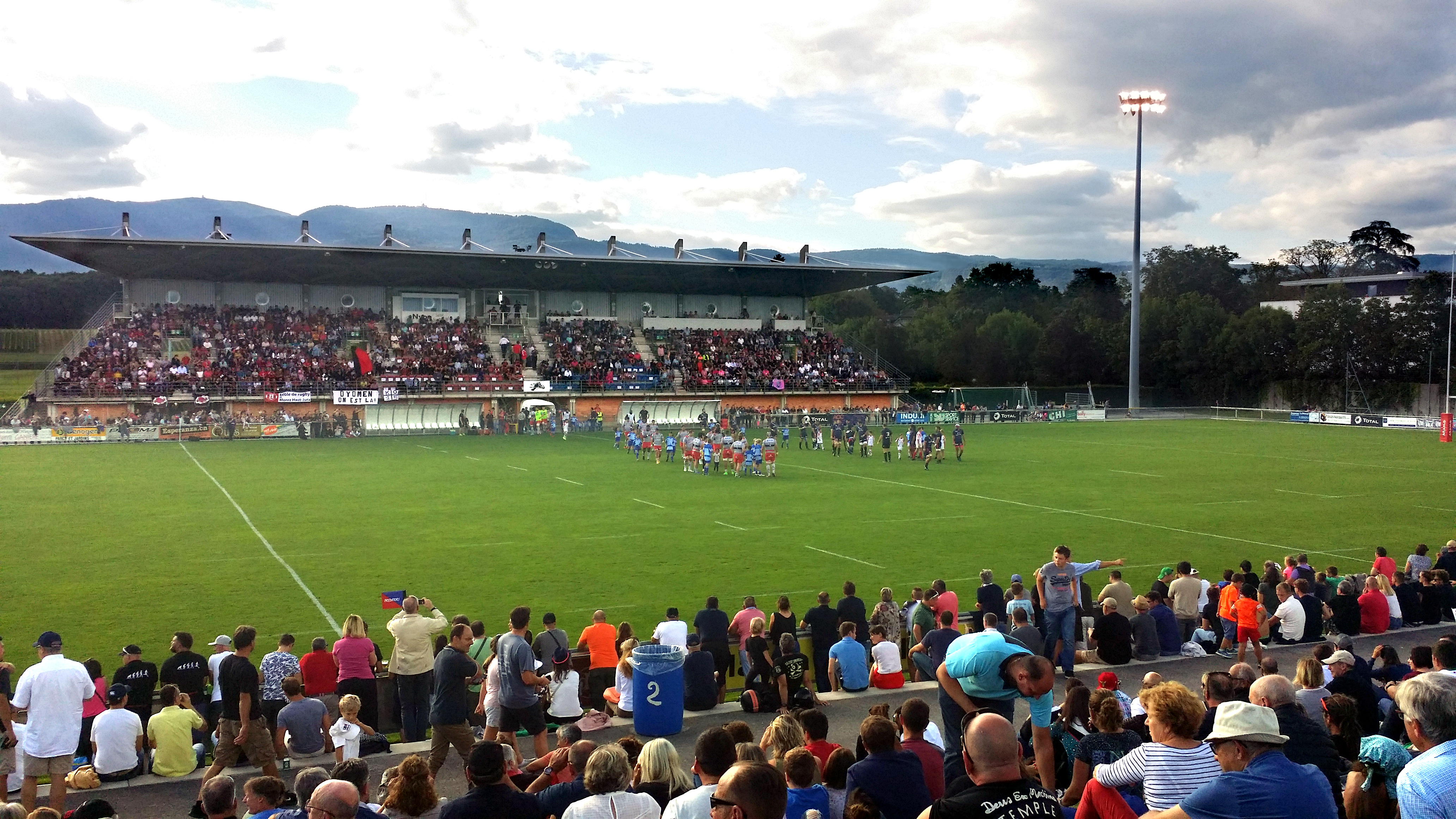 Match amical à Nyon entre l'US Oyonnax et le Stade Français. Victoire d'Oyonnax 30-28.